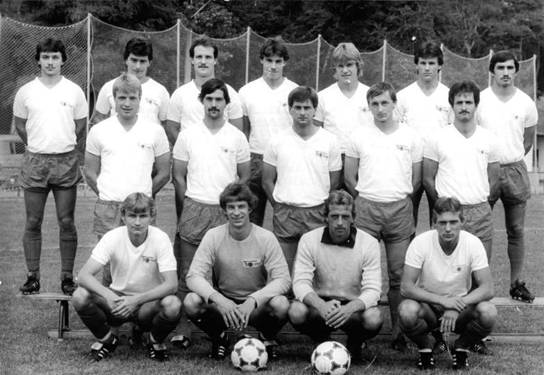 ADN-ZB-Mittelstädt-23.8.83-zin-Berlin: Die Mannschaft des 1. FC Union Berlin für die Fußball-Oberligasaison 1983-84. Vorn v.l.n.r.: Peter Riedtke, Torhüter Björn Dahms, Torhüter Wolfgang Gehrke und Bernd Quade. Mitte v.l.n.r.: Olaf Seier, Olaf Reinhold, Peter Wirth, Reiner Thomas und Ingo Kimmritz. Hinten v.l.n.r.: Henry Treppschuh, Mannschaftskapitän Lutz Möckel, Lutz Hovest, Holger Sattler, Heiko Lahn, Uwe Borchardt und Lutz Hendel.